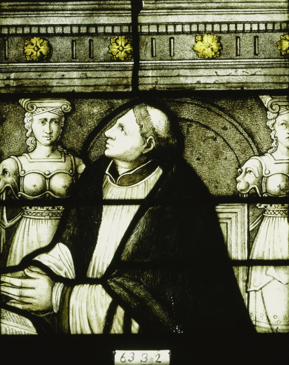 Sint Janskerk: interieur, glas in loodraam NR. 63, detail B 2